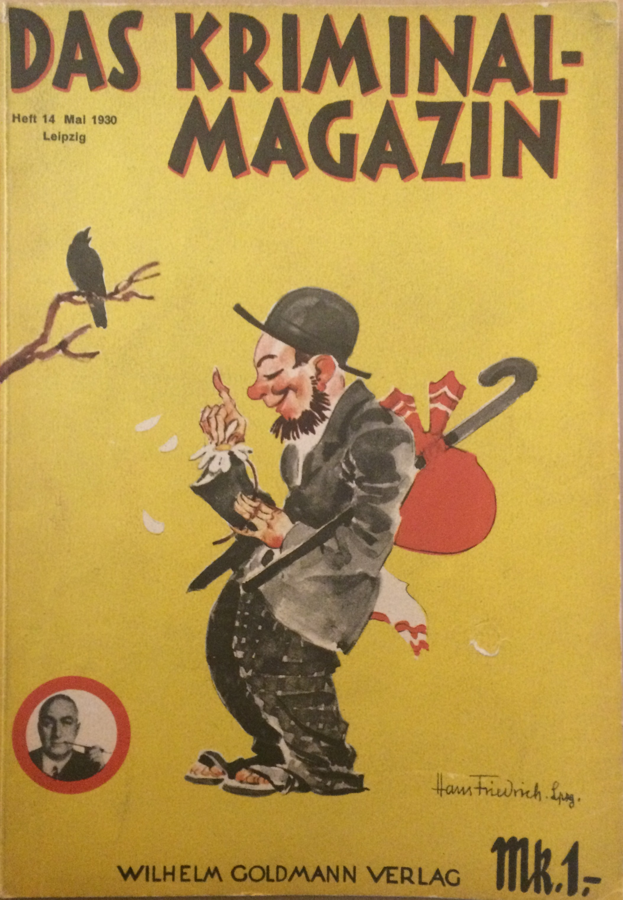 Kriminal-Magazin Heft 14, 1930